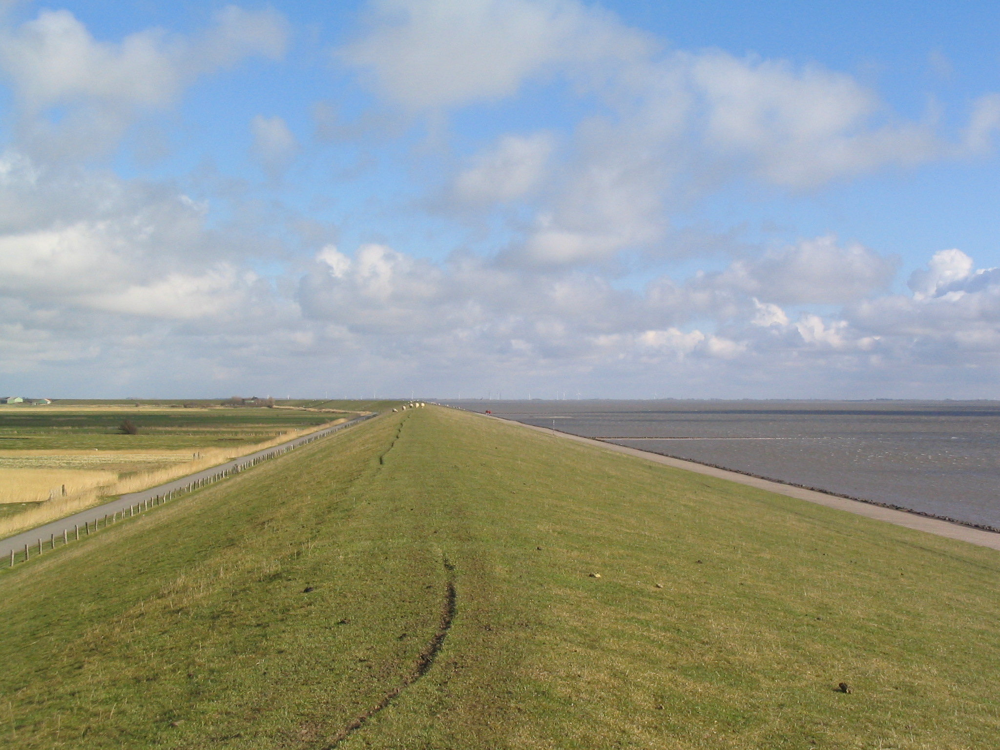 Dike on Nordstrand